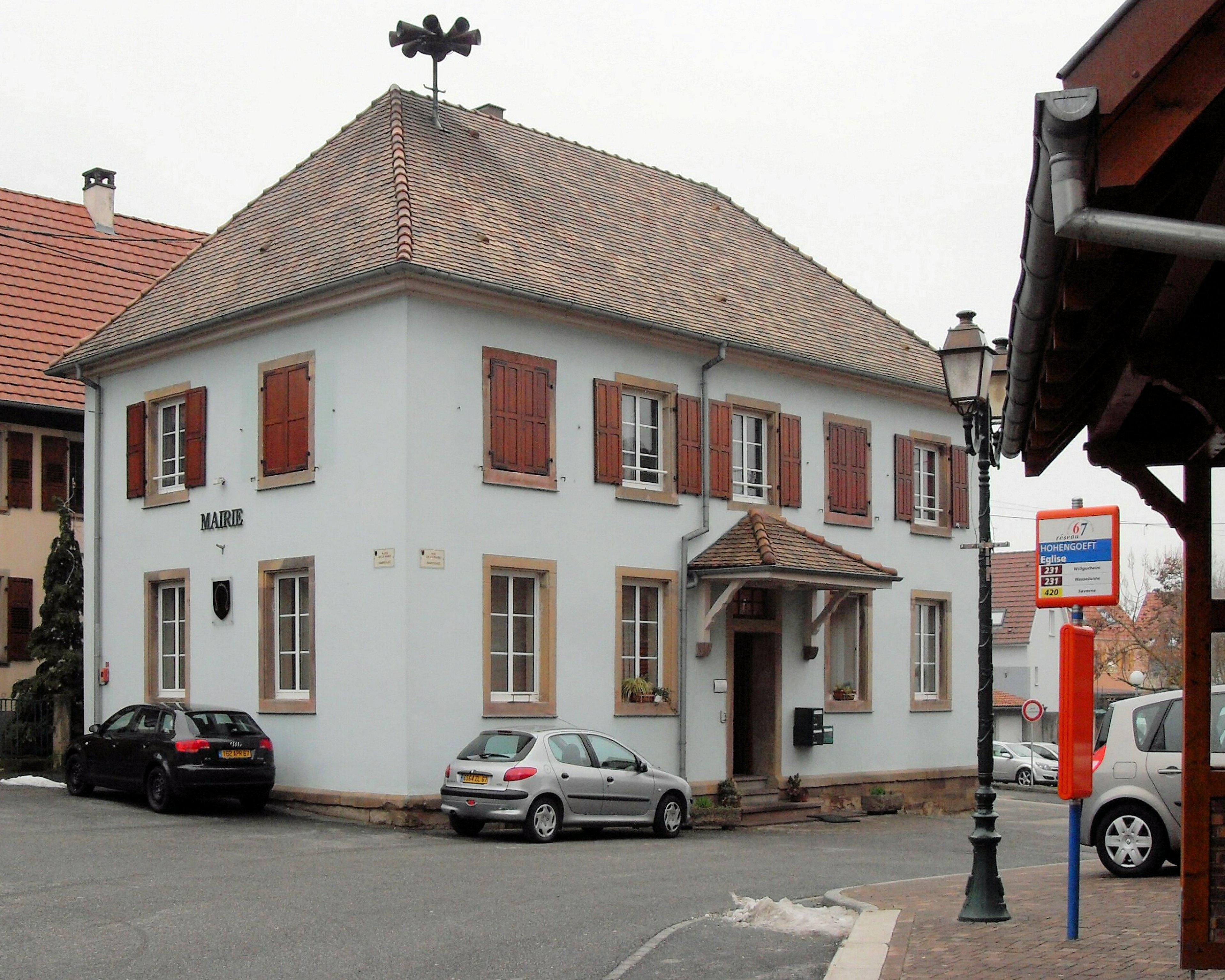 La mairie à Hohengœft